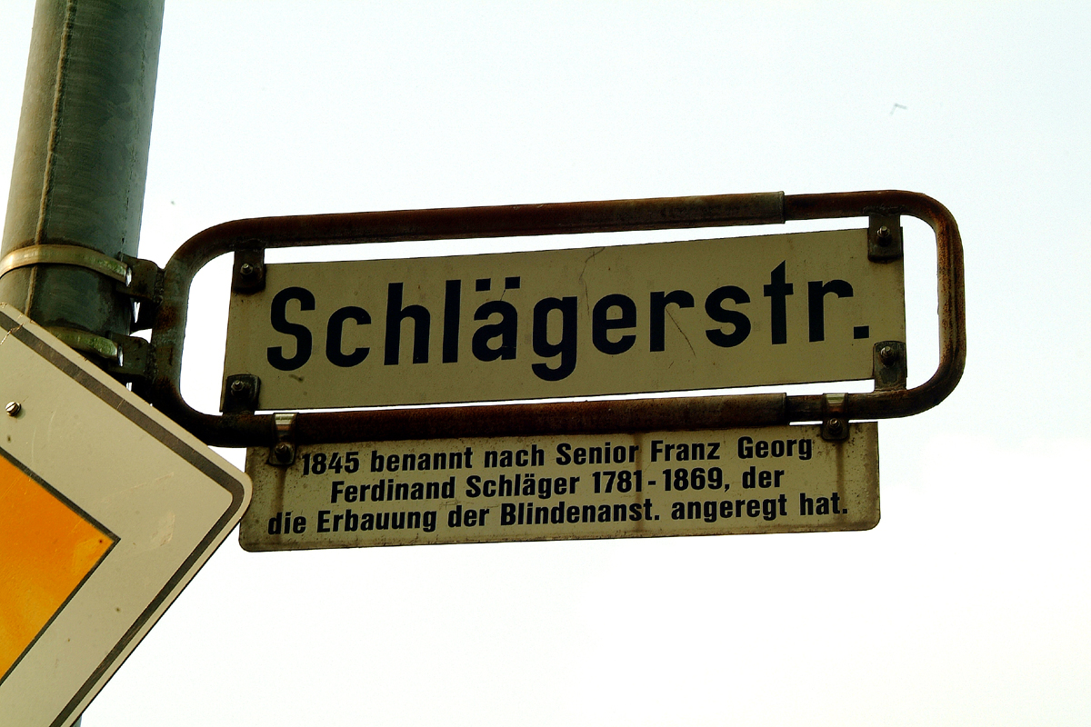 Sie haben ein besseres Bild? Sogar ein historisches Dokument als Bild(ungsförderung)? Zeigen Sie' s uns. Stiften Sie es Ihren Kindern, unseren Enkeln, allen Menschen. Hier.